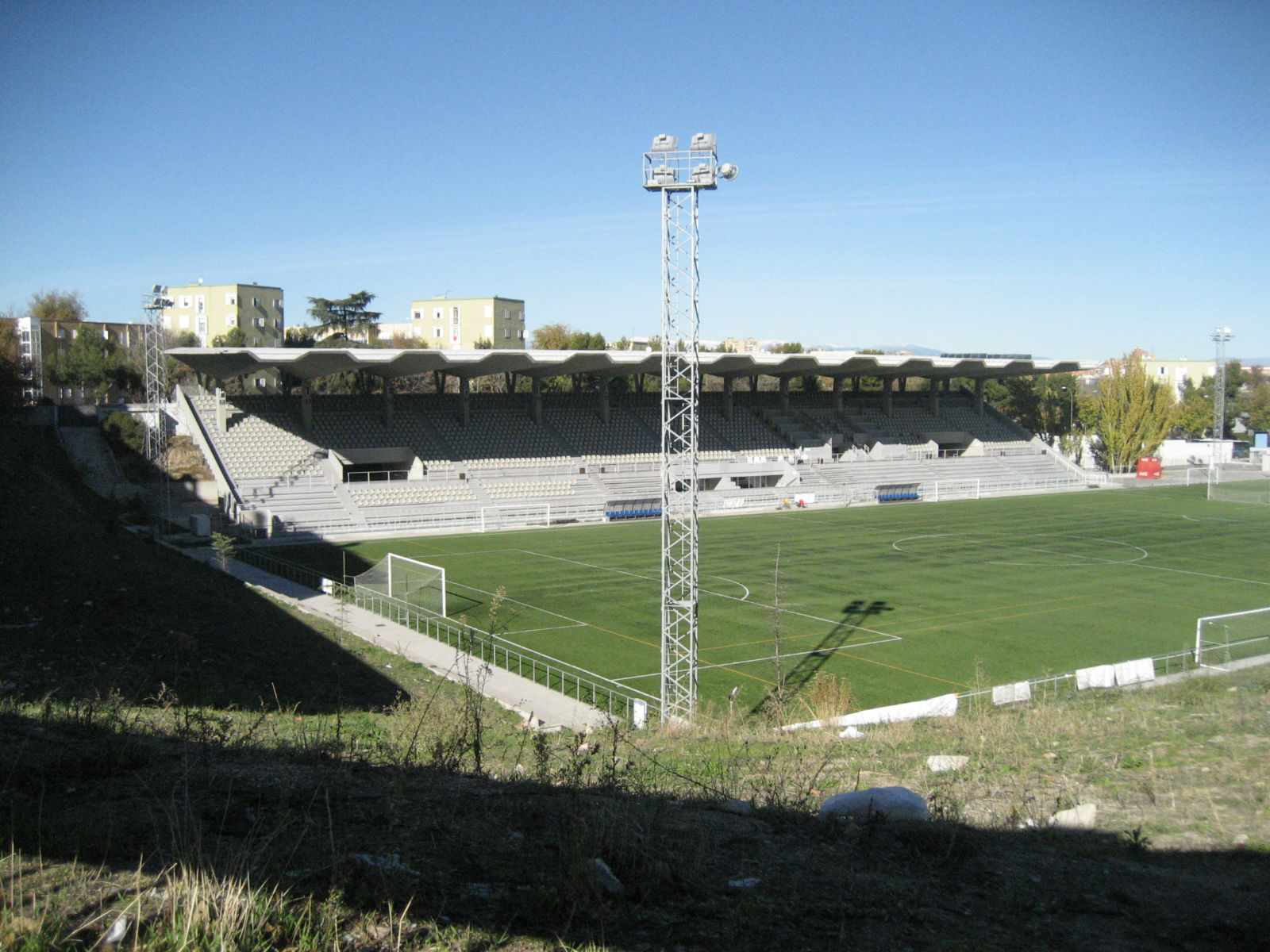 Estadio Antiguo Canódromo Docomomo Ibérico has entry 1503 related to this item.